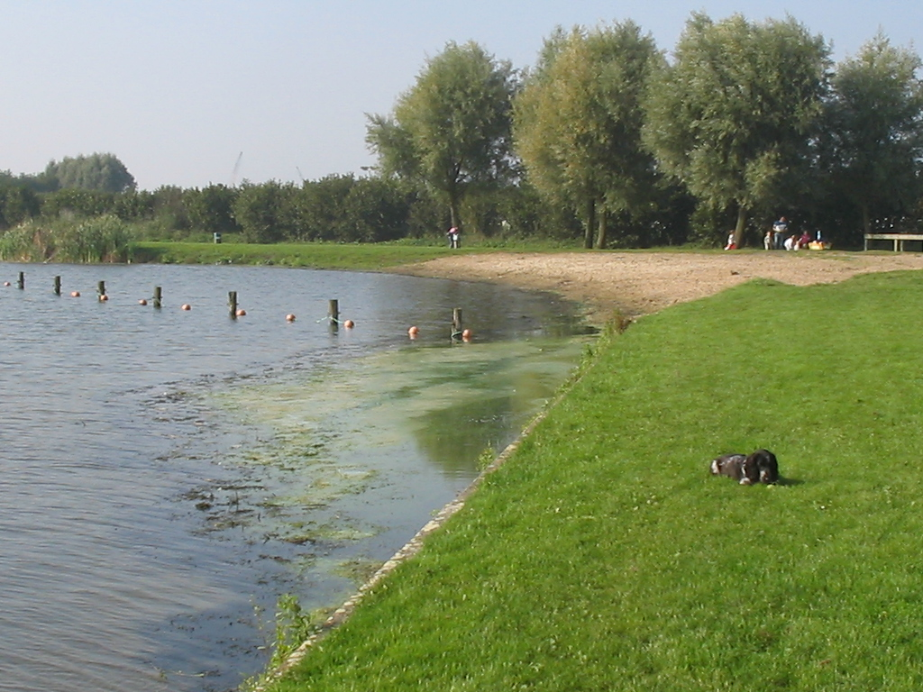 Dobbeplas, Nootdorp, 15 oktober 2005 (Met Elbi in het gras)